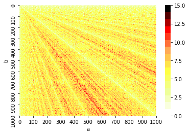 L'image montre le nombre d'étapes de l'algorithme d'Euclide en fonction des nombres a et b.